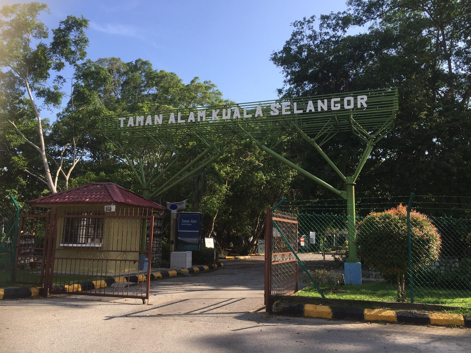 クアラセランゴール自然公園の入り口